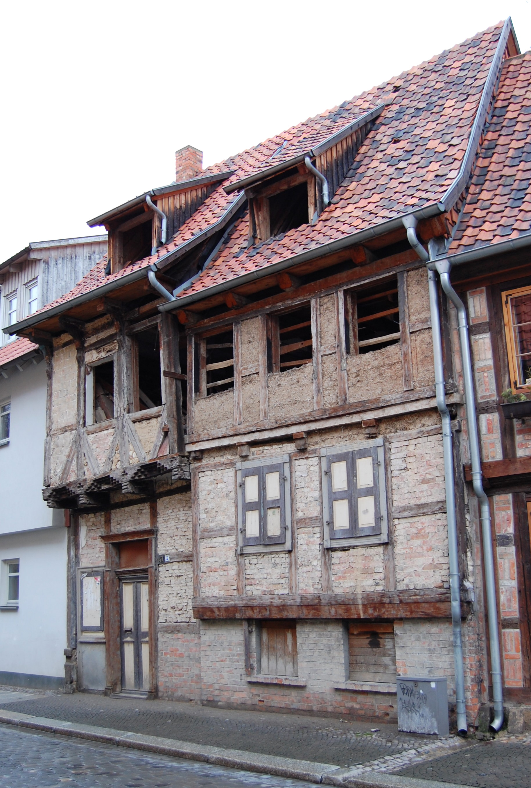 Haus Schmale Straße 47 in Quedlinburg